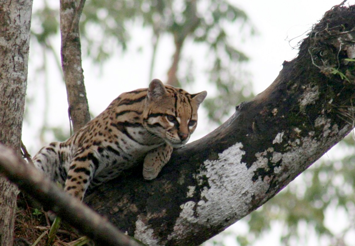 Ozelot auf Baum